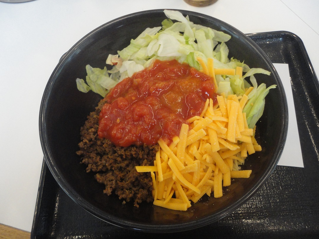 タコライス（東京都新宿区内吉野家店舗にて、2017年7月24日撮影）